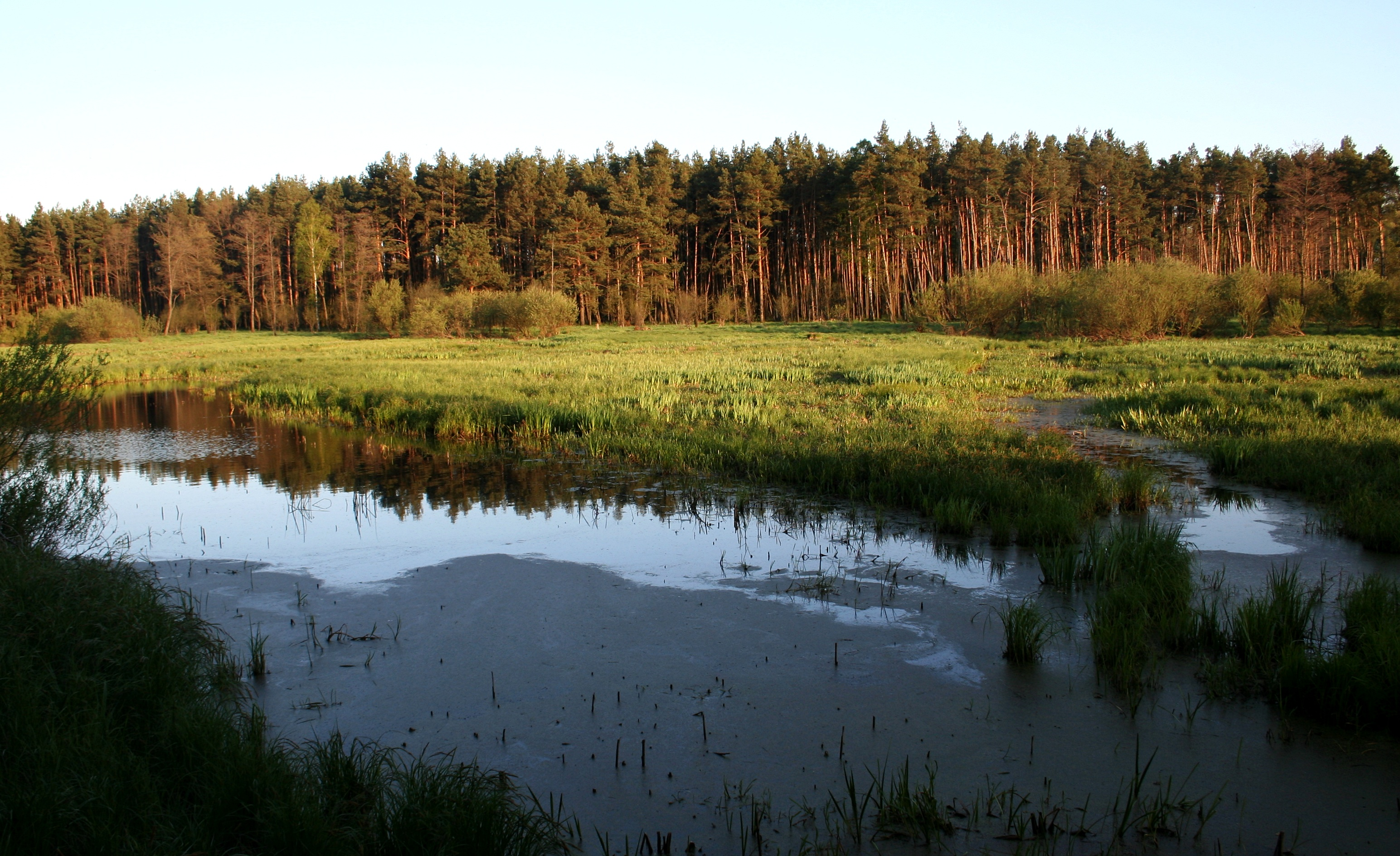 Załęczański Park Krajobrazowy - użytek ekologiczny Wronia Woda